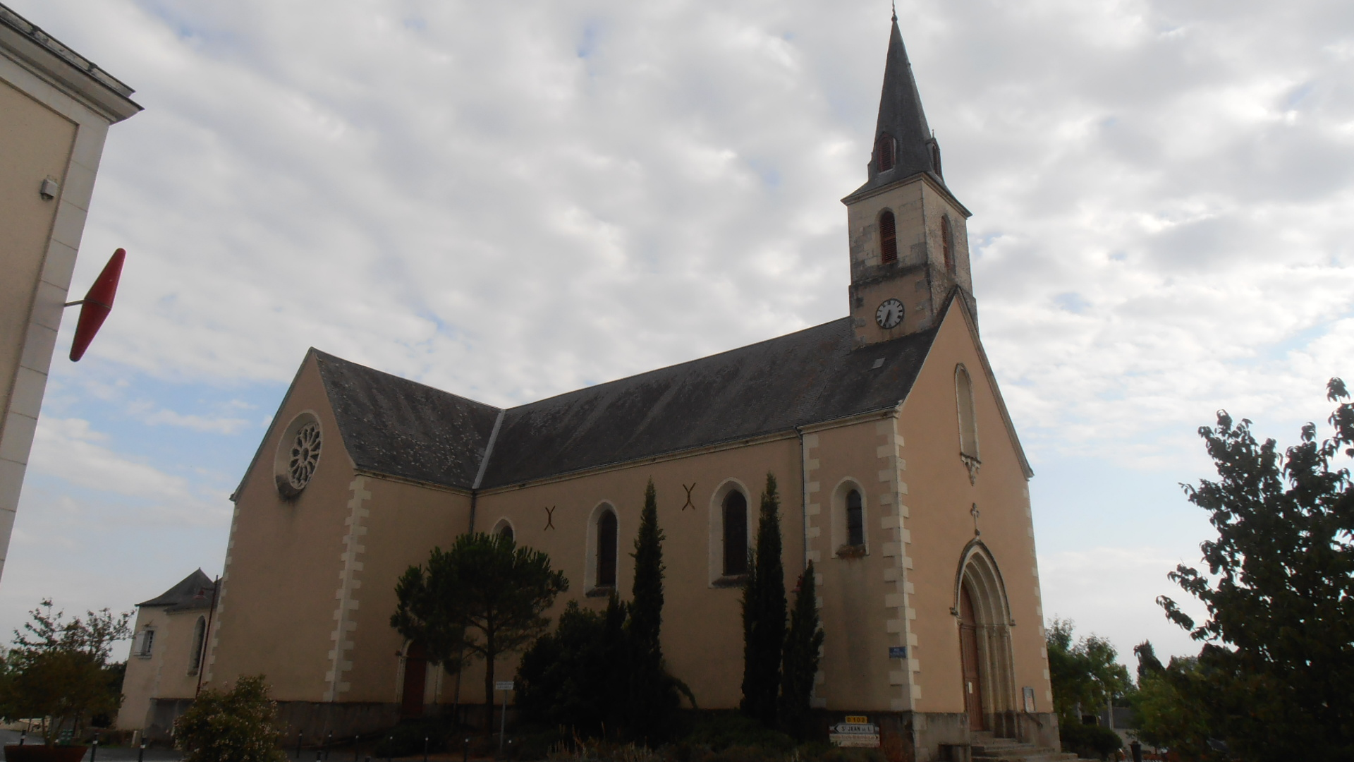 L'église de Saint-Léger-des-Bois (Maine-et-Loire, France).